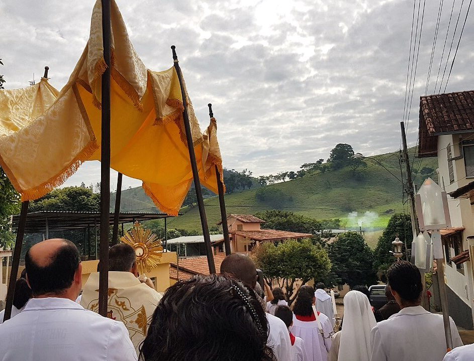 Tradicional procissão de Corpus Christi em Faria Lemos - MG This photo has been taken in the country: Brazil